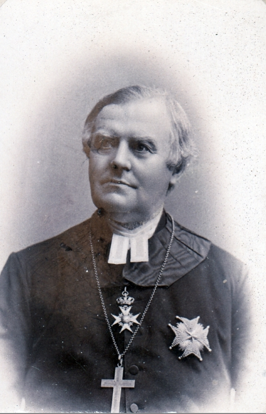 Swedisg bishop Pehr Sjöbring (1819-1900)